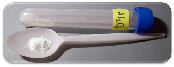 Oxid hlinitý - Al2O3